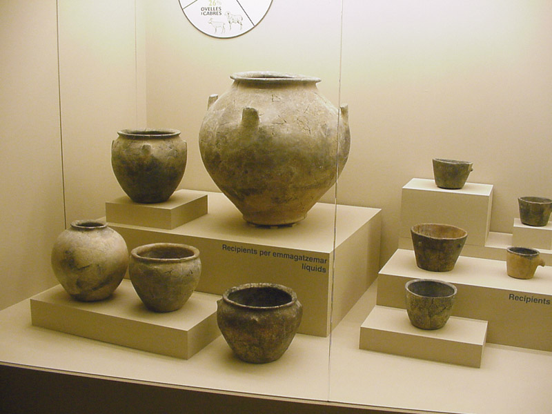 Talaiotic Ceramics